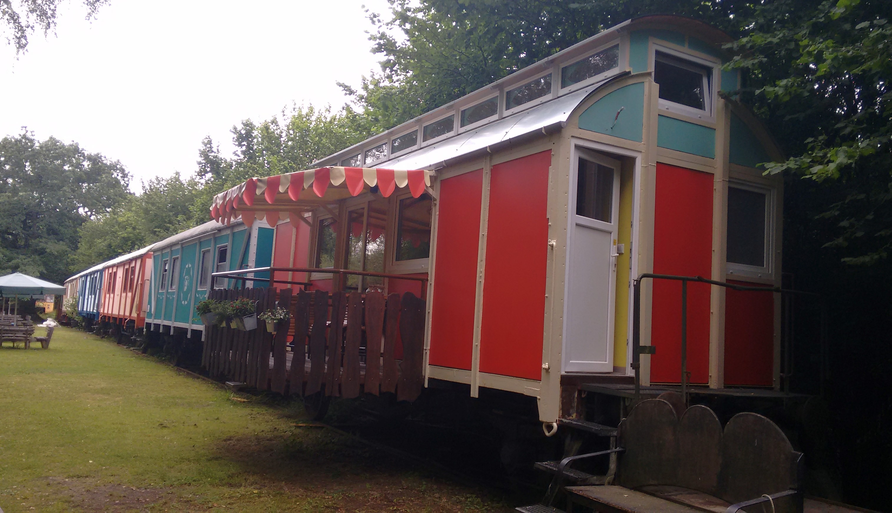 Wohnwagons der Erlebnisbahn Ratzeburg am Standort Schmilau